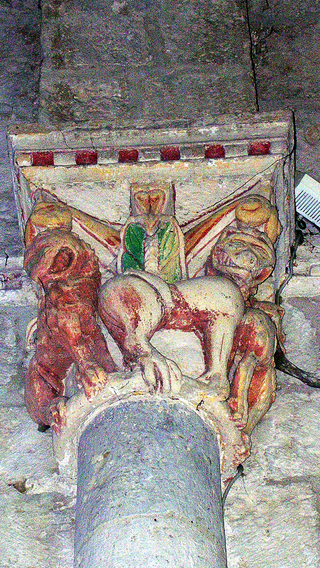 Chapiteau polychrome de l'église de Vianne (Lot-et-Garonne, France)